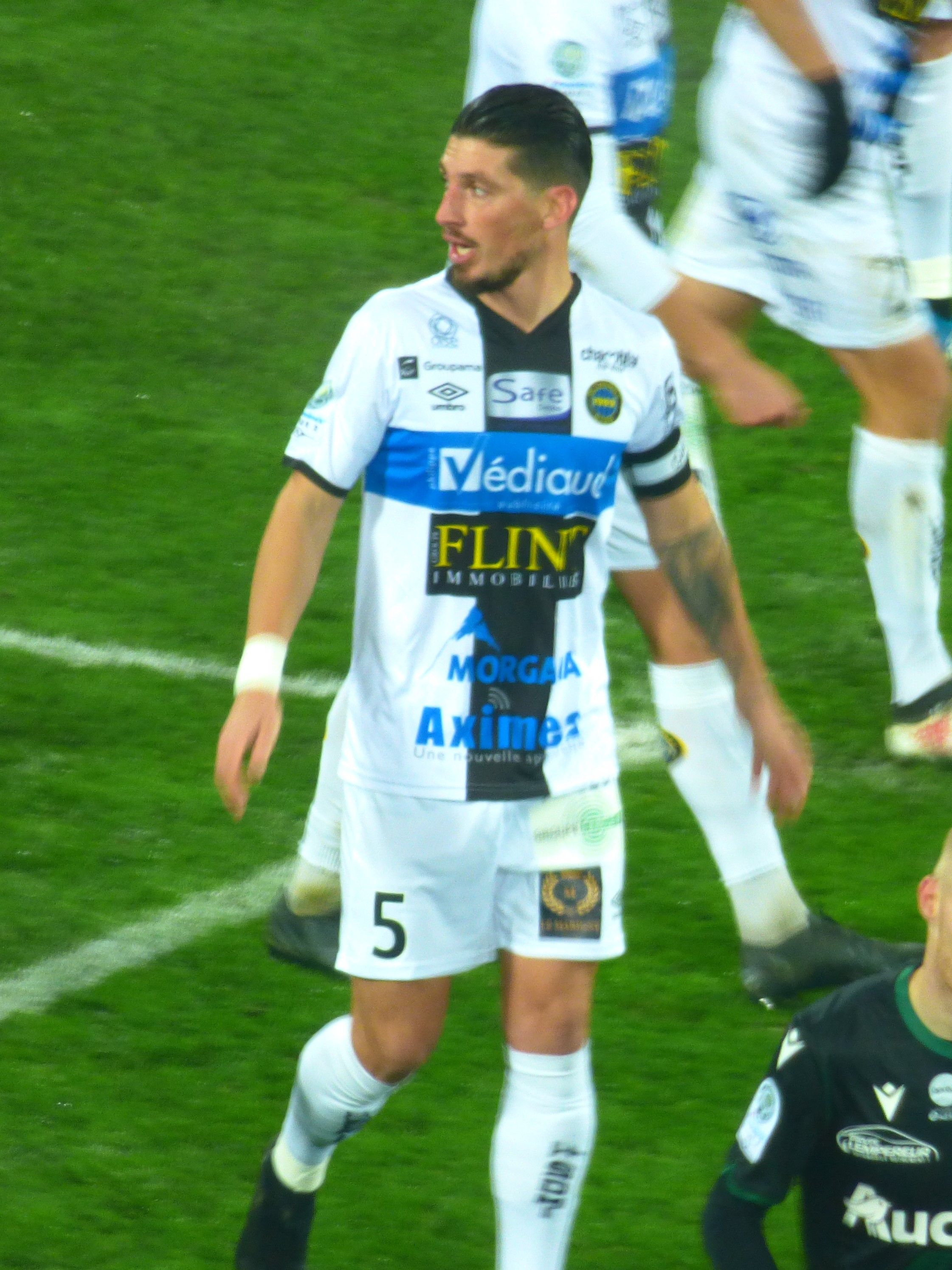 Thibault Jaques avant le match Lens - Chambly, comptant pour la dix-septième journée du championnat de France de football de Ligue 2 2019-2020, le 3 décembre 2019.